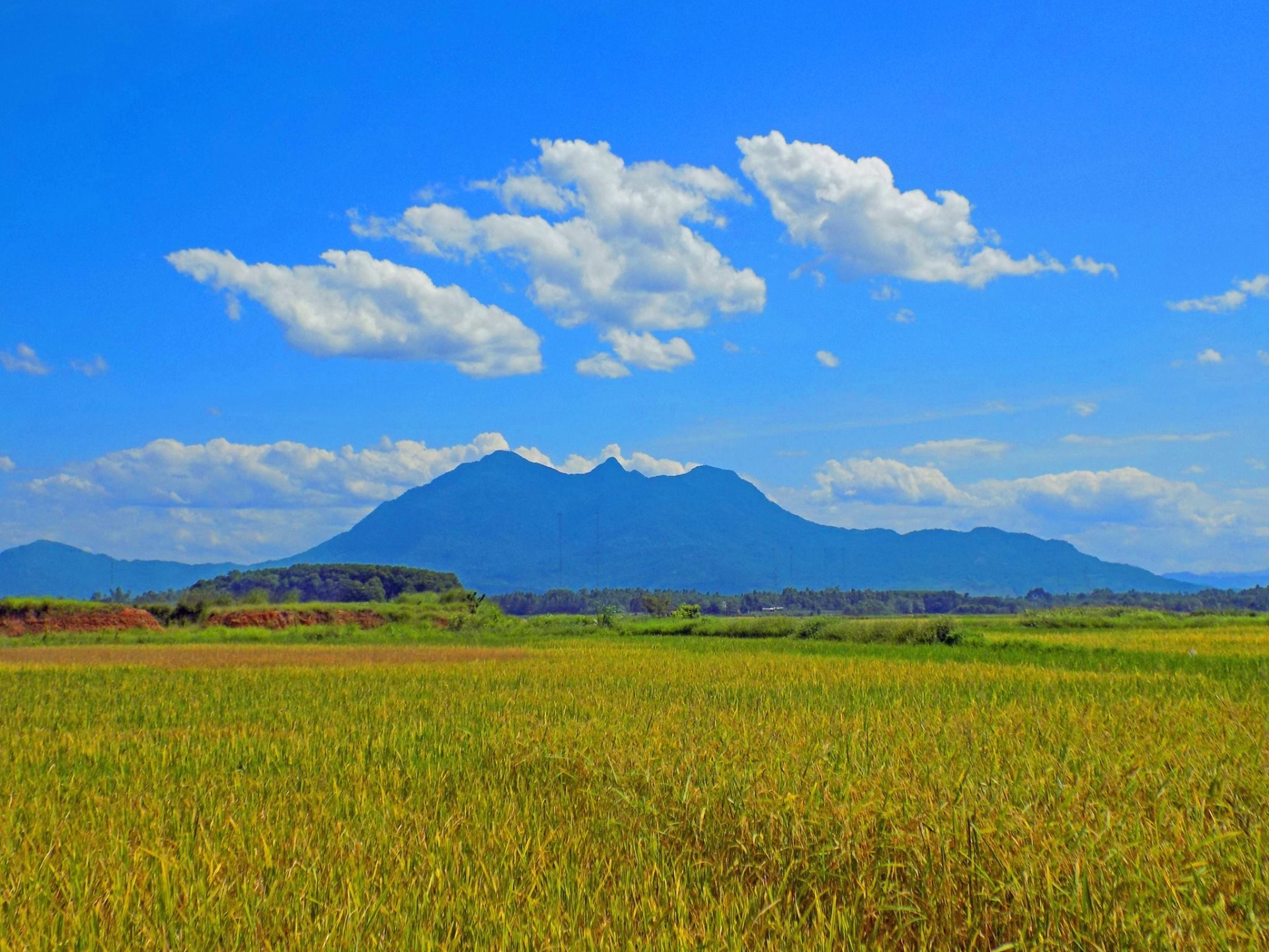 Chụp từ trường tiểu học Phú Phương.